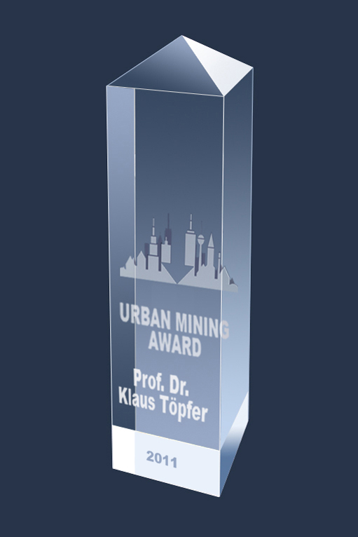 Konzept des 1. URBAN MINING Awards